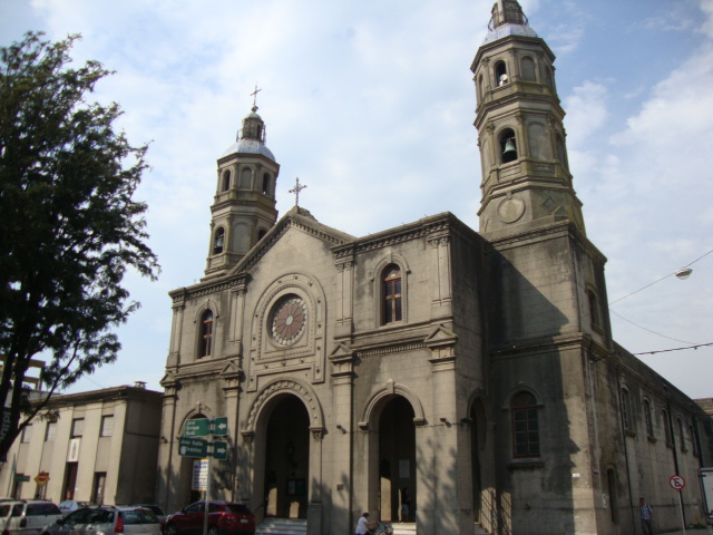 Catedral de Nuestra Señora de Guadalupe. Ubicada en el departamento de Canelones